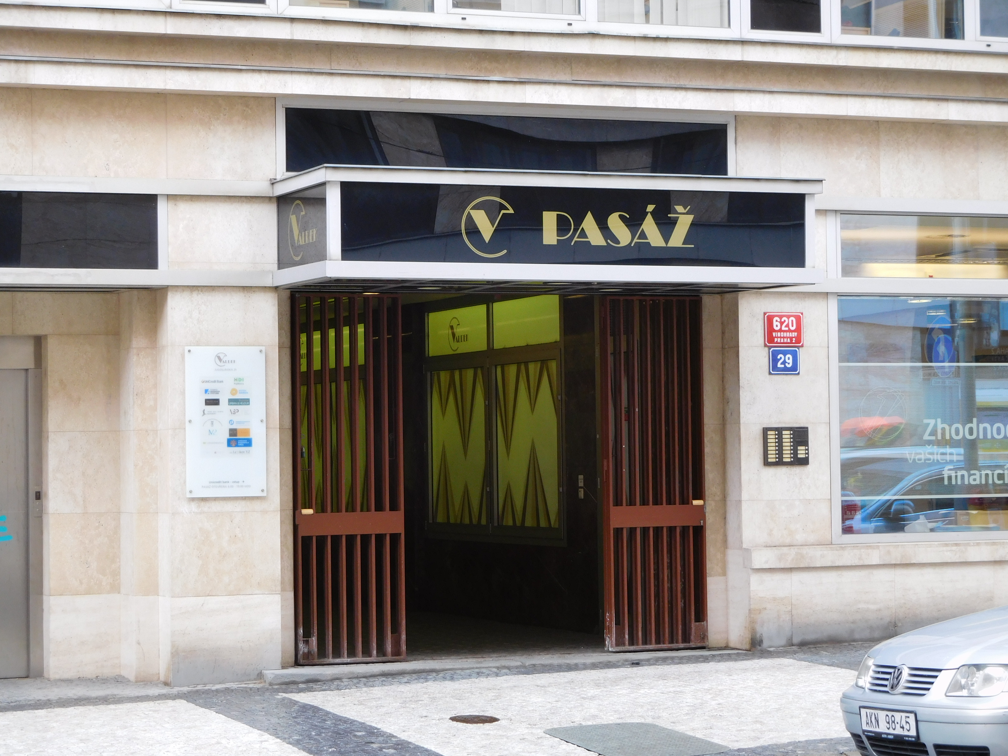 Praha - Vinohrady, Jugoslávská, Pasáž Valdek